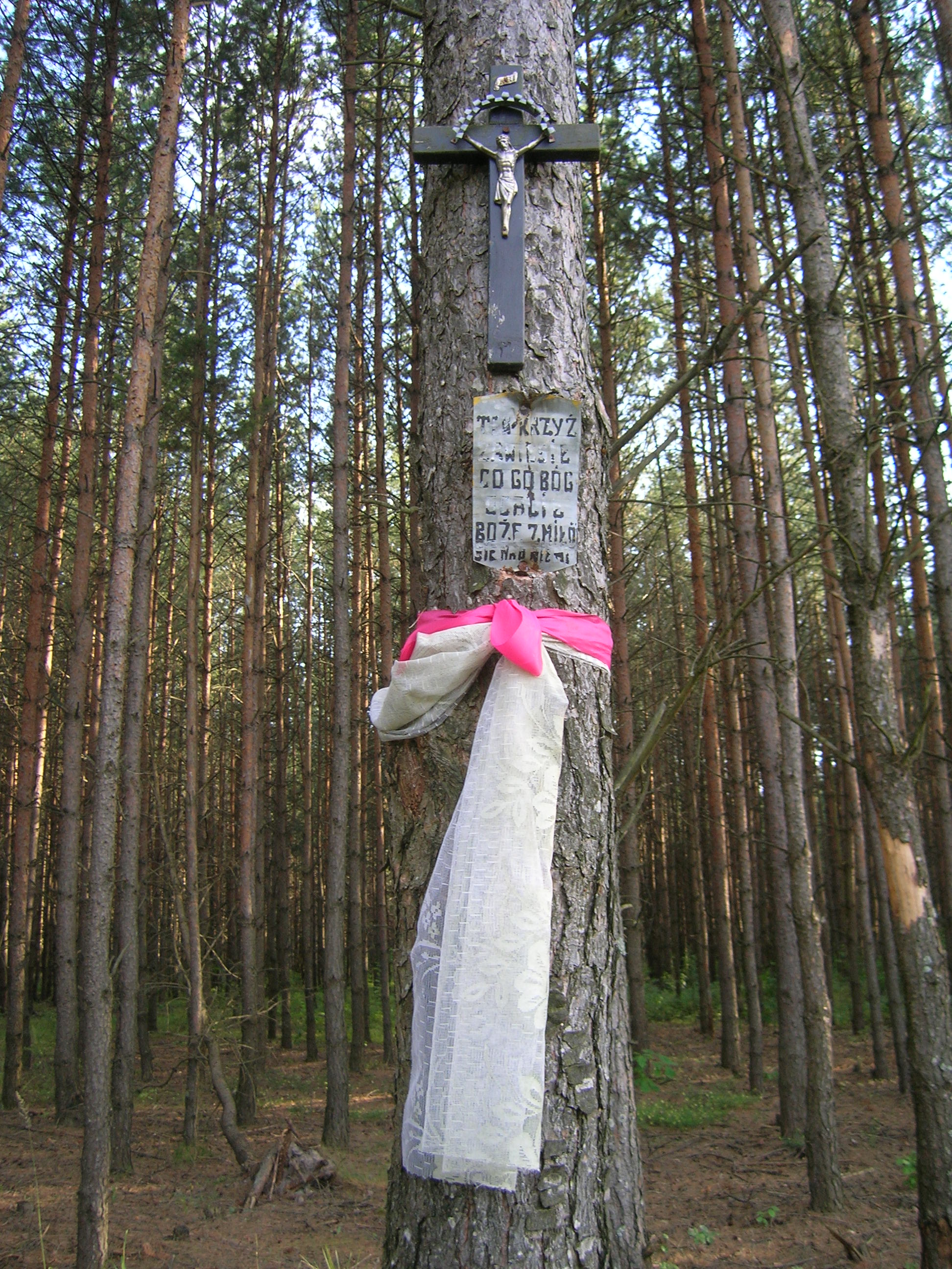 Ostrówki. Krzyż i tabliczka umieszczone na Trupim Polu przez osobę ocałałą z egzekucji. Napis na tabliczce: "Ten krzyż zawiesił, co go Bóg ocalił. Boże zmiłuj się nad nami."